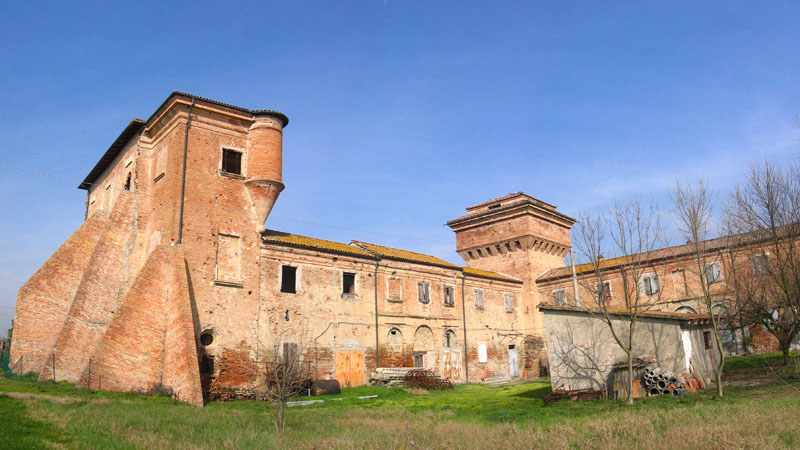 Veduta di Selva Malvezzi